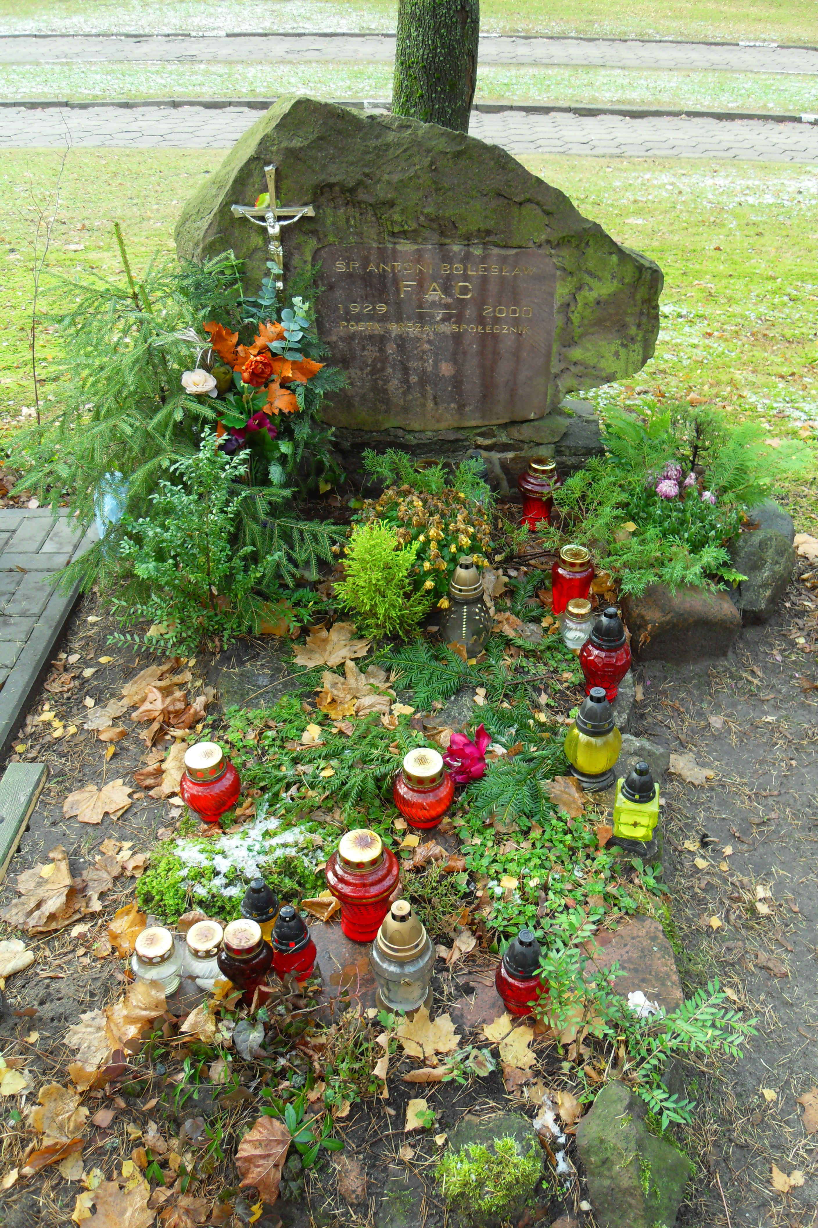 Gdańsk Wrzeszcz. Cmentarz Srebrzysko, grób Antoni Bolesław Fac.